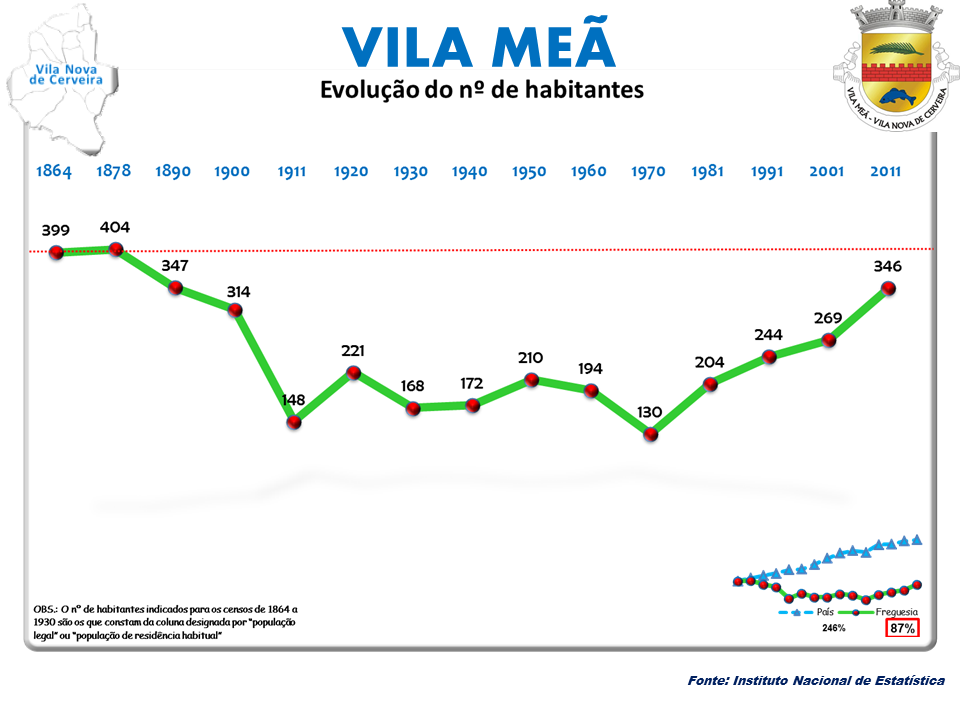 Censos 1864/2011